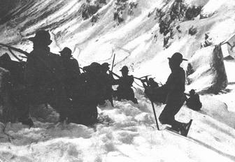 Alpini in combattimento sulle montagne